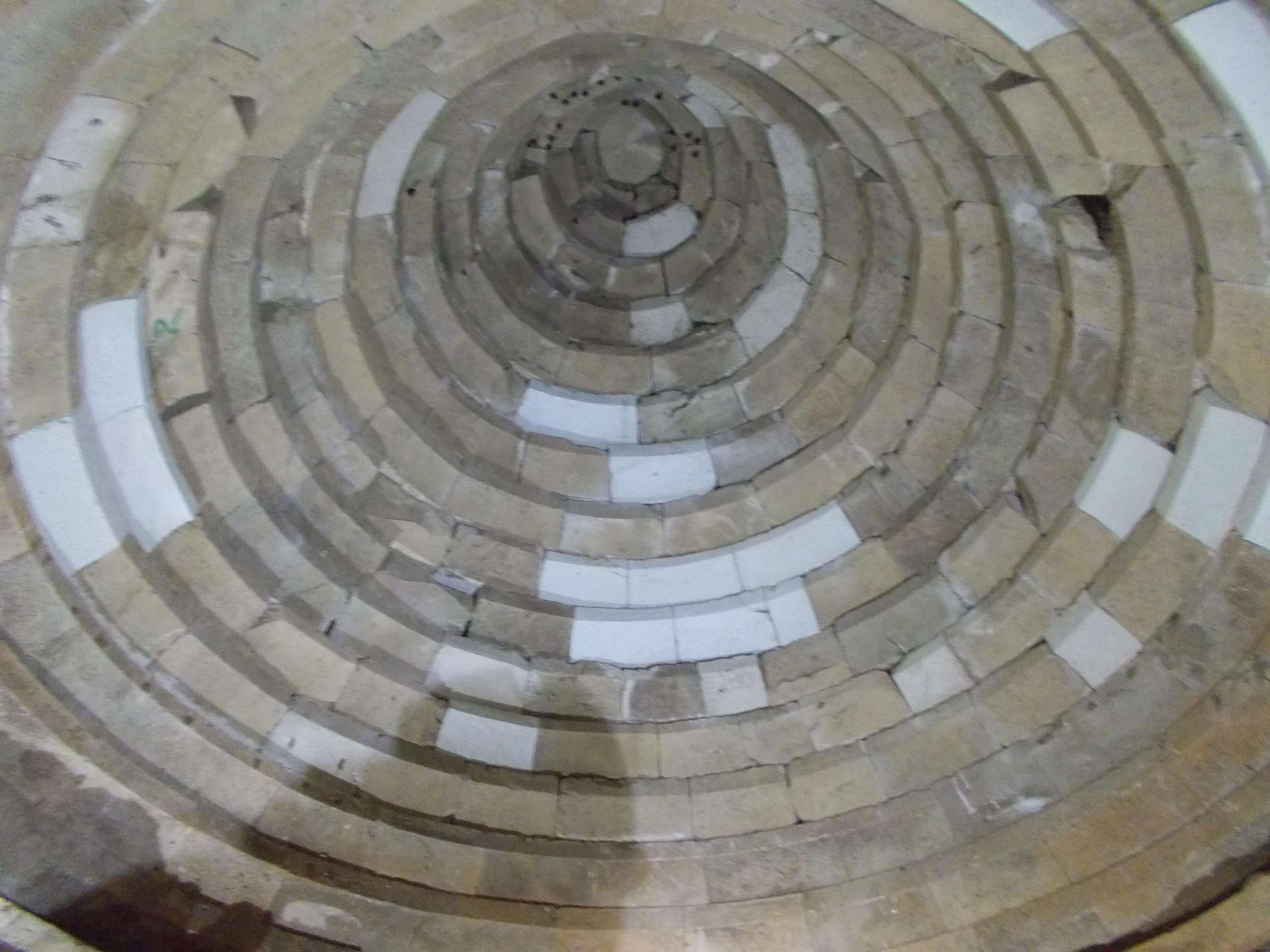 Храмов комплекс "Четиньова могила", Купол